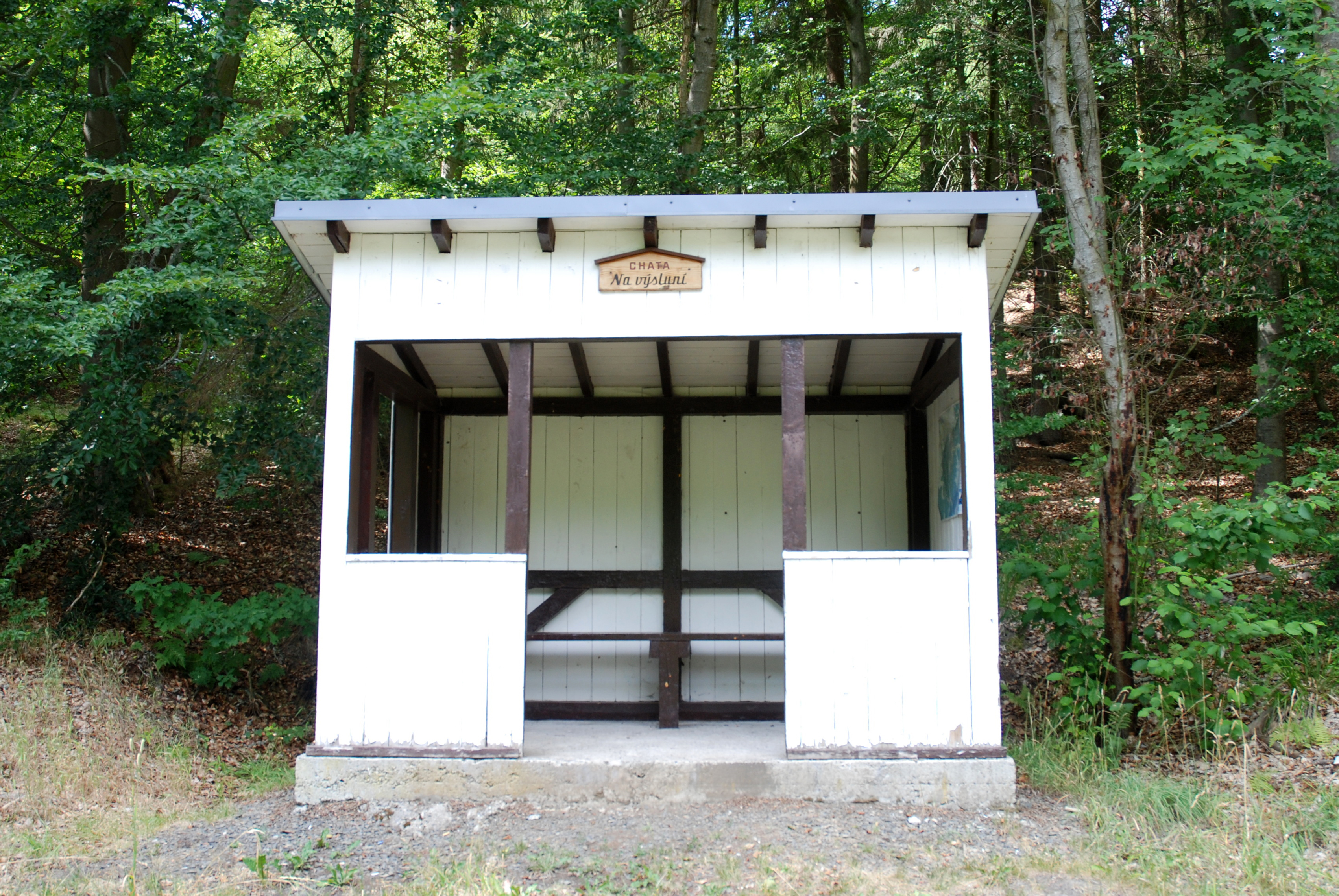 Chata Na Výsluní v karlovarských lázeňských lesích u Jungmannovy stezky